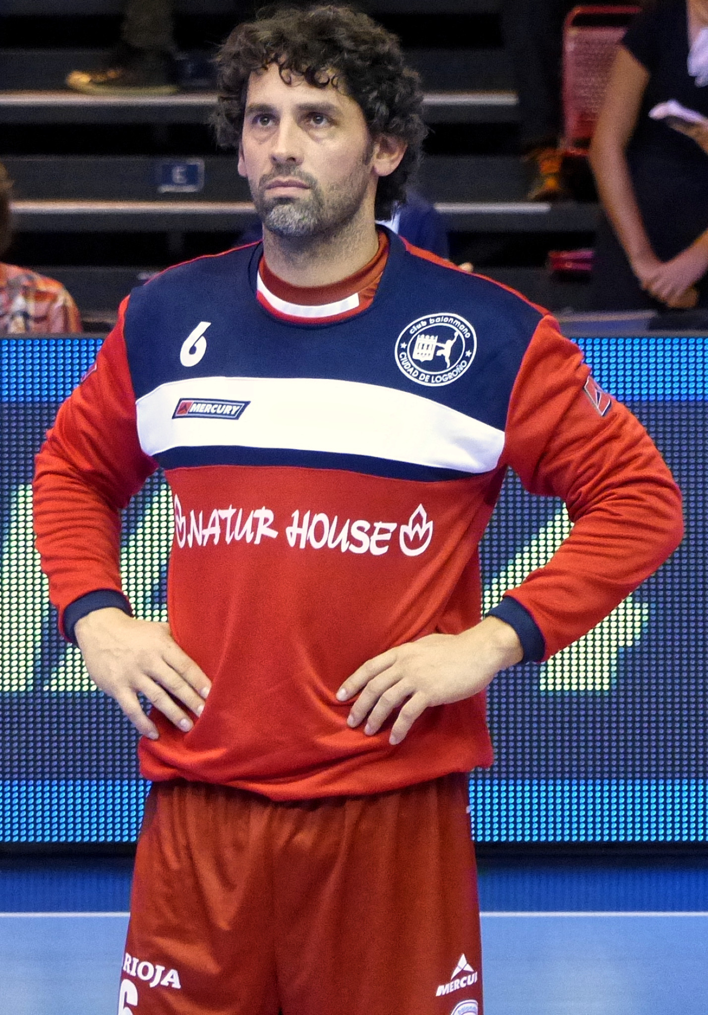 Rencontre de ligue des champions 2014-15 entre le PSG et le club espagnol Naturhouse La Rioja. A la Halle Carpentier (Paris), le 12 octobre 2014.